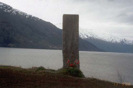 Bautastein på Naustdal. Foto: Haugen og Dalen bygdeutviklingslag. Fra Riksantikvarens Kulturminnesøk.